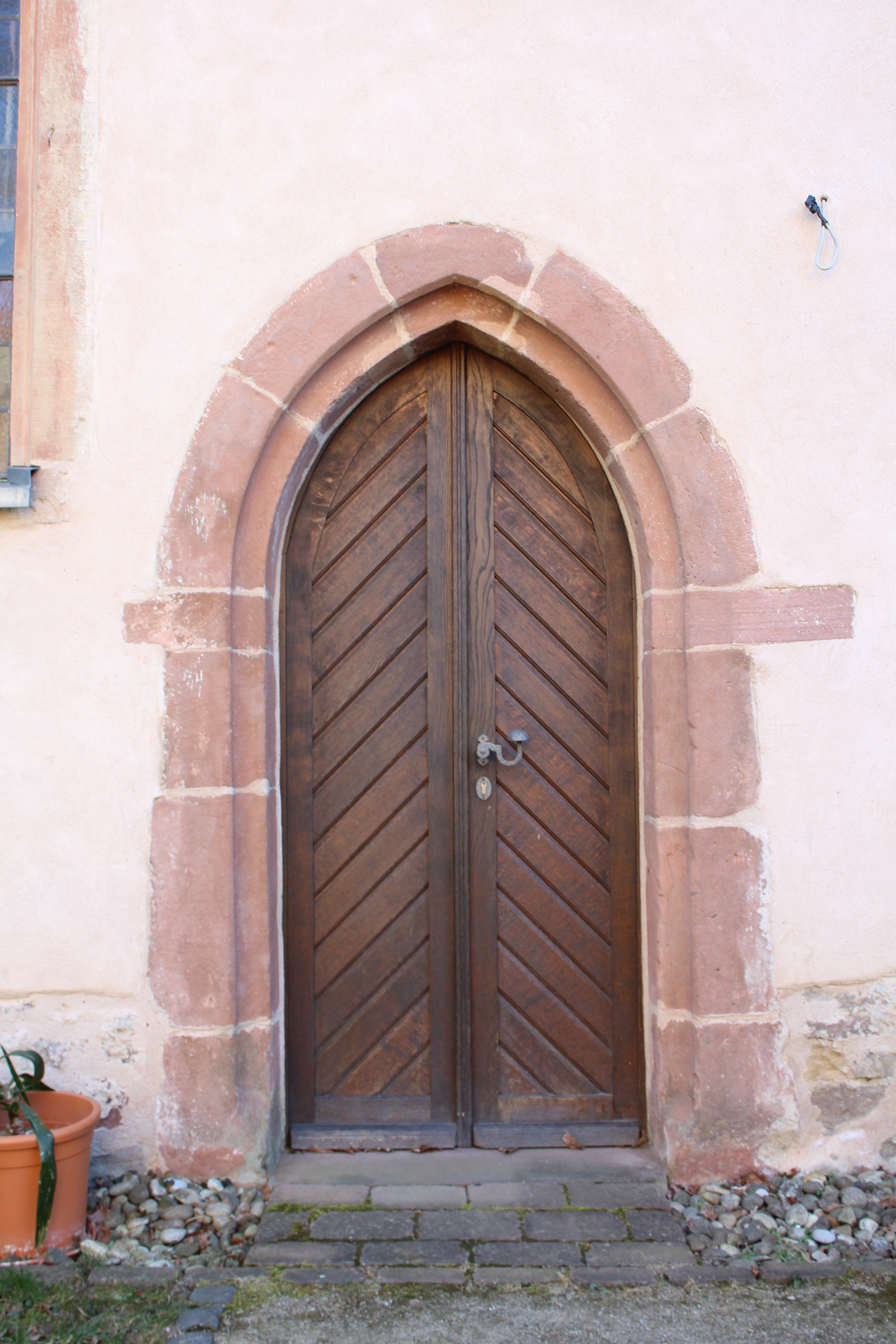 Evangelische Kirche Eichen (Nidderau), Main-Kinzig-Kreis, Hessen, Deutschland